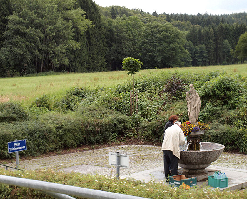 Wallfahrtsort Heiligenbrunn bei Jägerwirth, Gemeinde Fürstenzell, Wasserentnahme am Brunnen